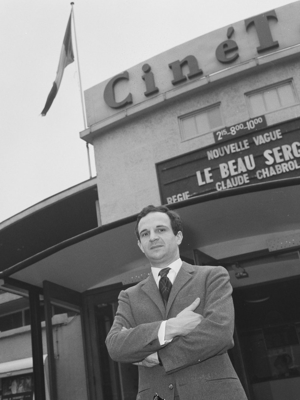 François Truffaut le 15 mars 1965 (lors d'un festival, ou une rétrospective consacrée à la Nouvelle Vague ?), posant devant le cinéma CinéTol à Amsterdam, où est à l'affiche le film Le Beau Serge de Claude Chabrol, un autre cinéaste emblématique de ce mouvement.